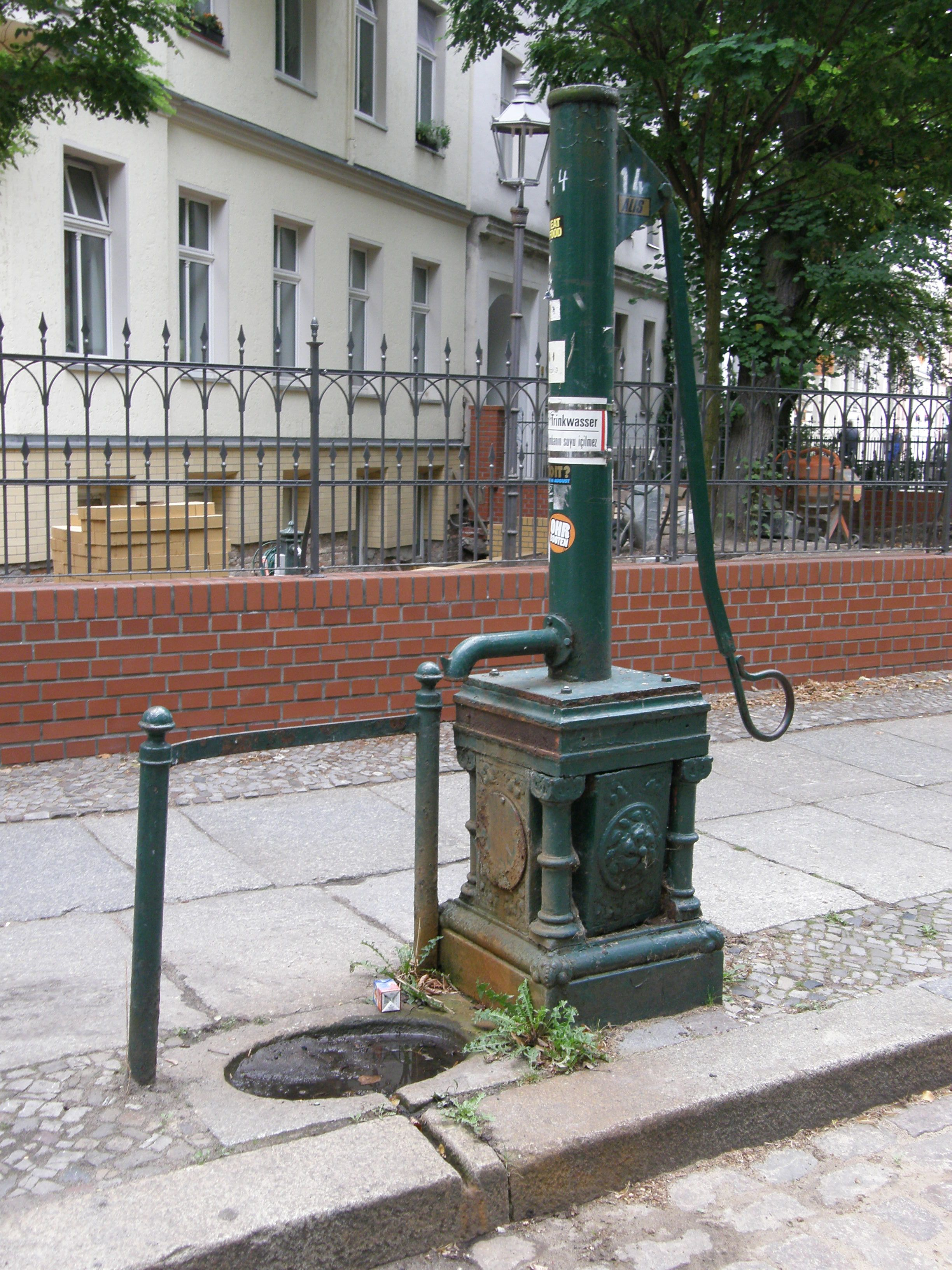 Straßenbrunnen im Erkelenzdamm Höhe Hausnummer 25 in Berlin-Kreuzberg